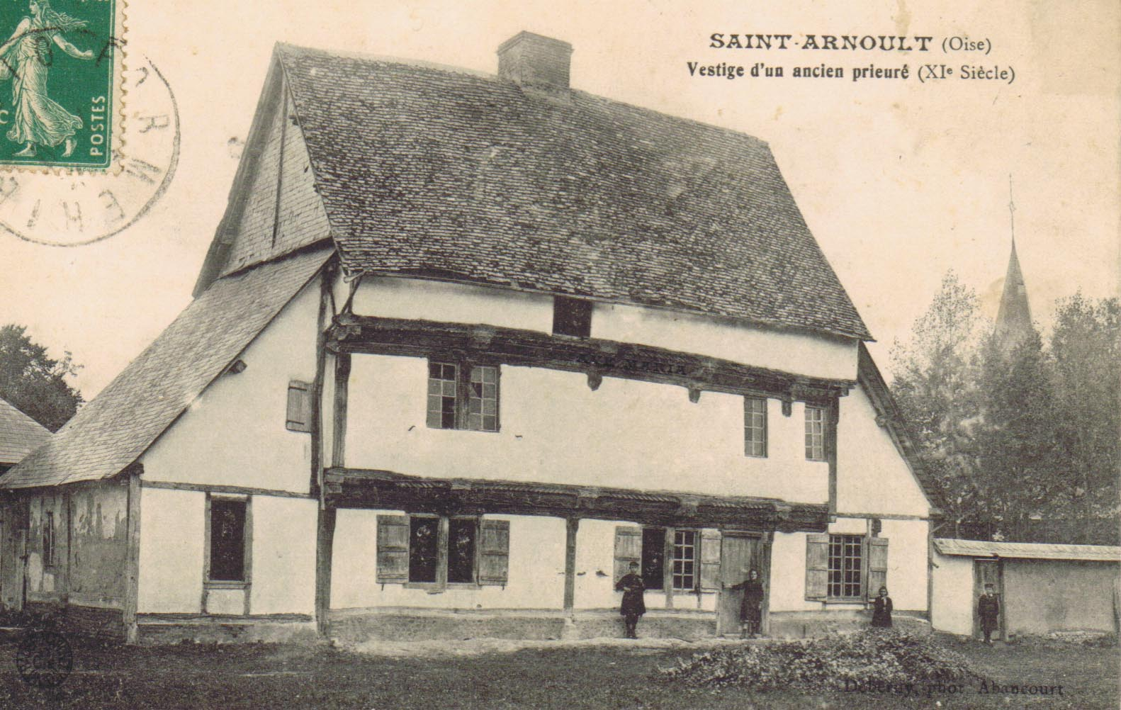 Carte postale affranchie en 1910,du Prieuré vers 1900